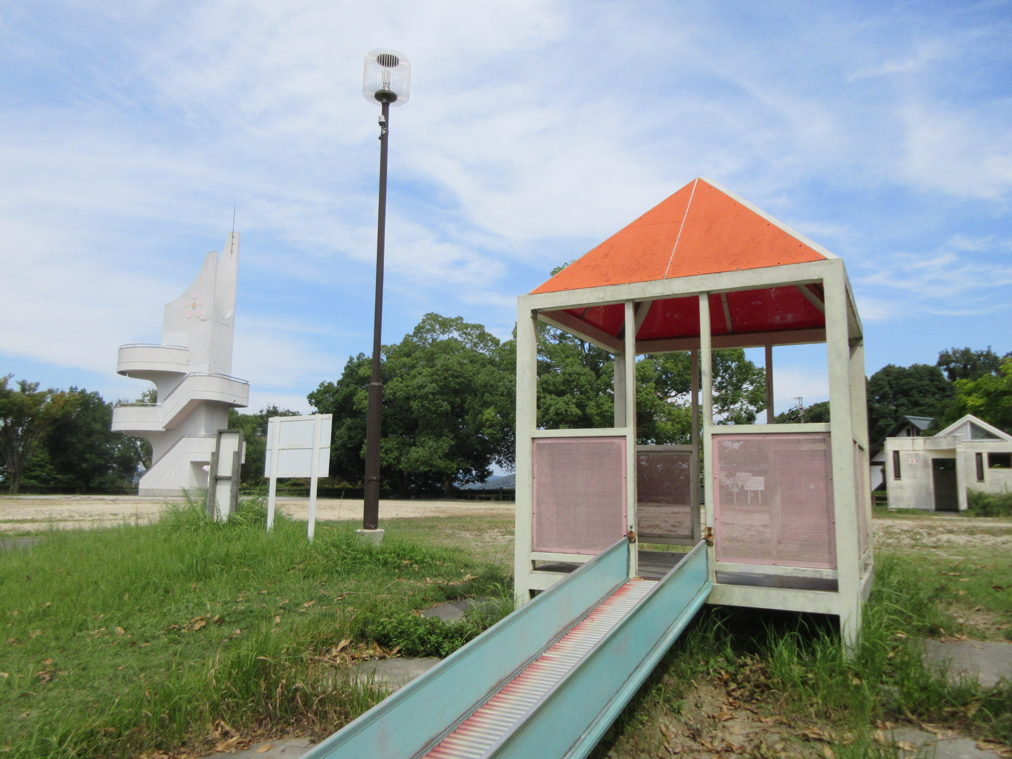 梅園公園（岡崎市稲熊町字6丁目）